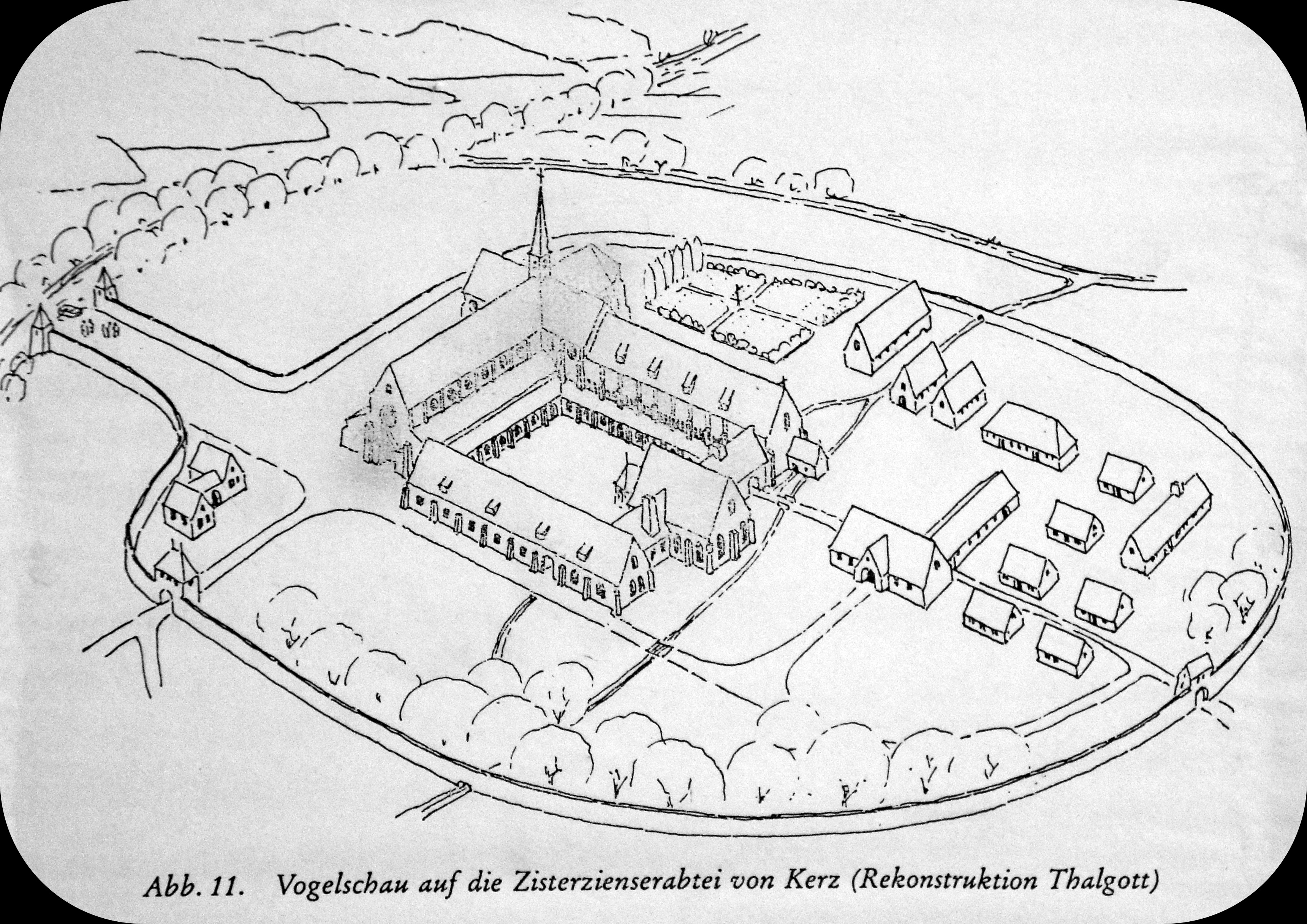 plan de l'ancien monastère cistercien